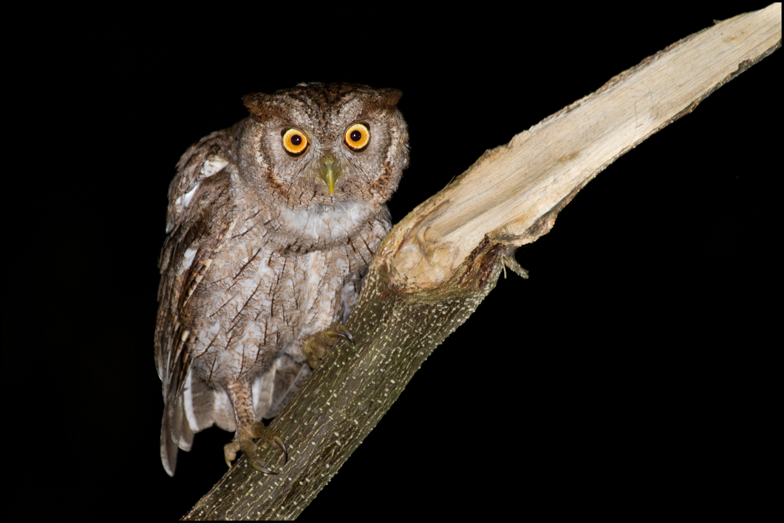 Bijagua, Costa Rica